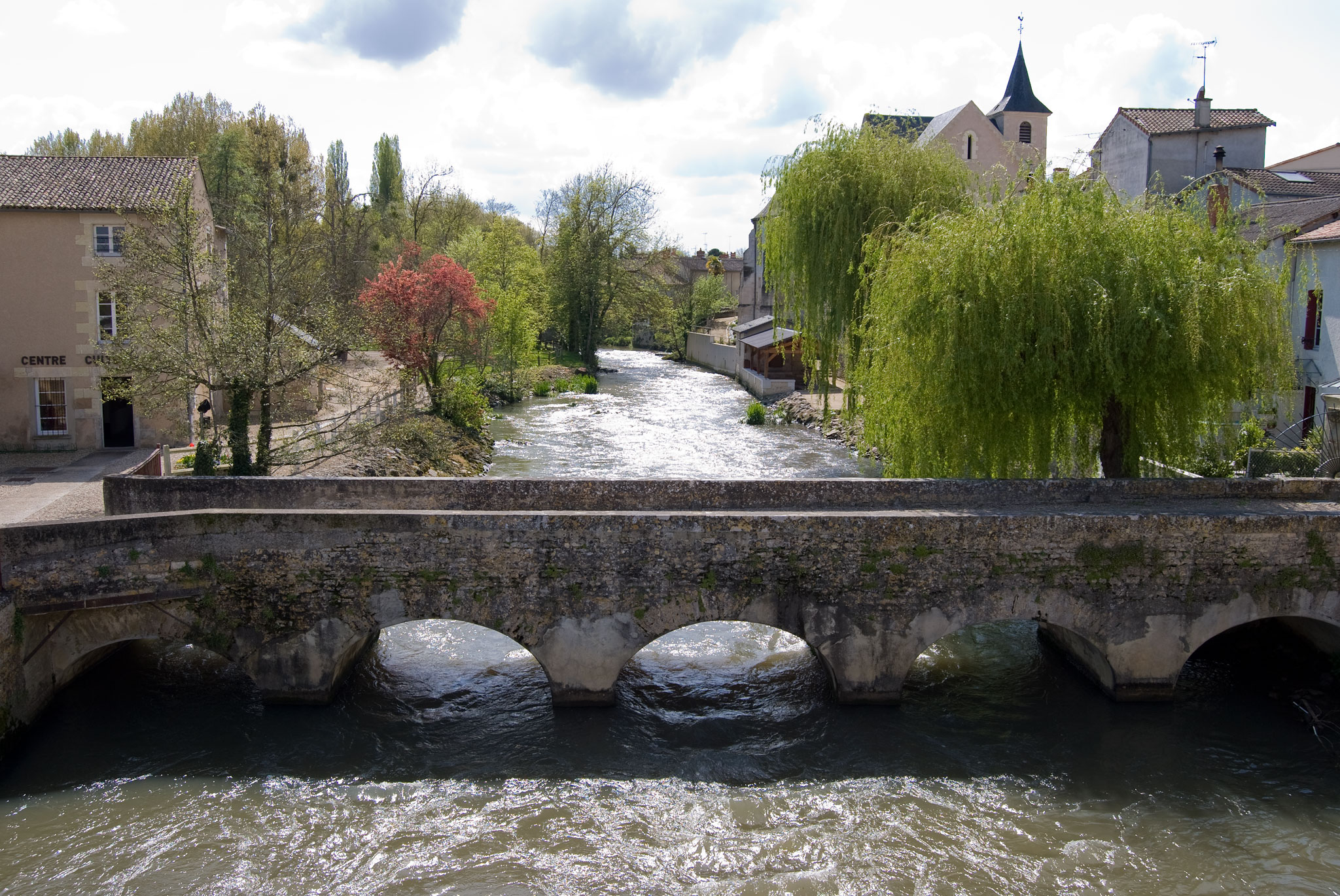 Le centre du Chasseneuil-du-Poitou